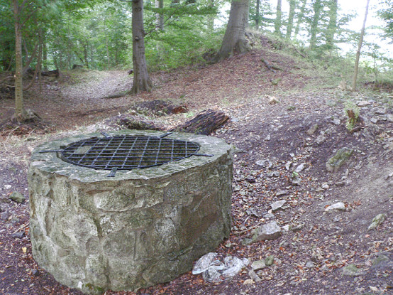 Brunnen Burg Winzenburg Foto aufgenommen von Benutzer Benutzer:AxelHH, September 2006